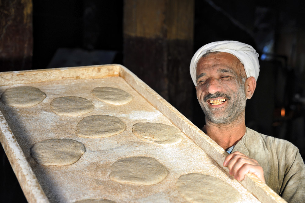 الخباز المصرى , يقوم بتحضير الخميرة فى شكلها الاولى لتدخل الفرن وتخرج فى صورة الخبز التقليدى